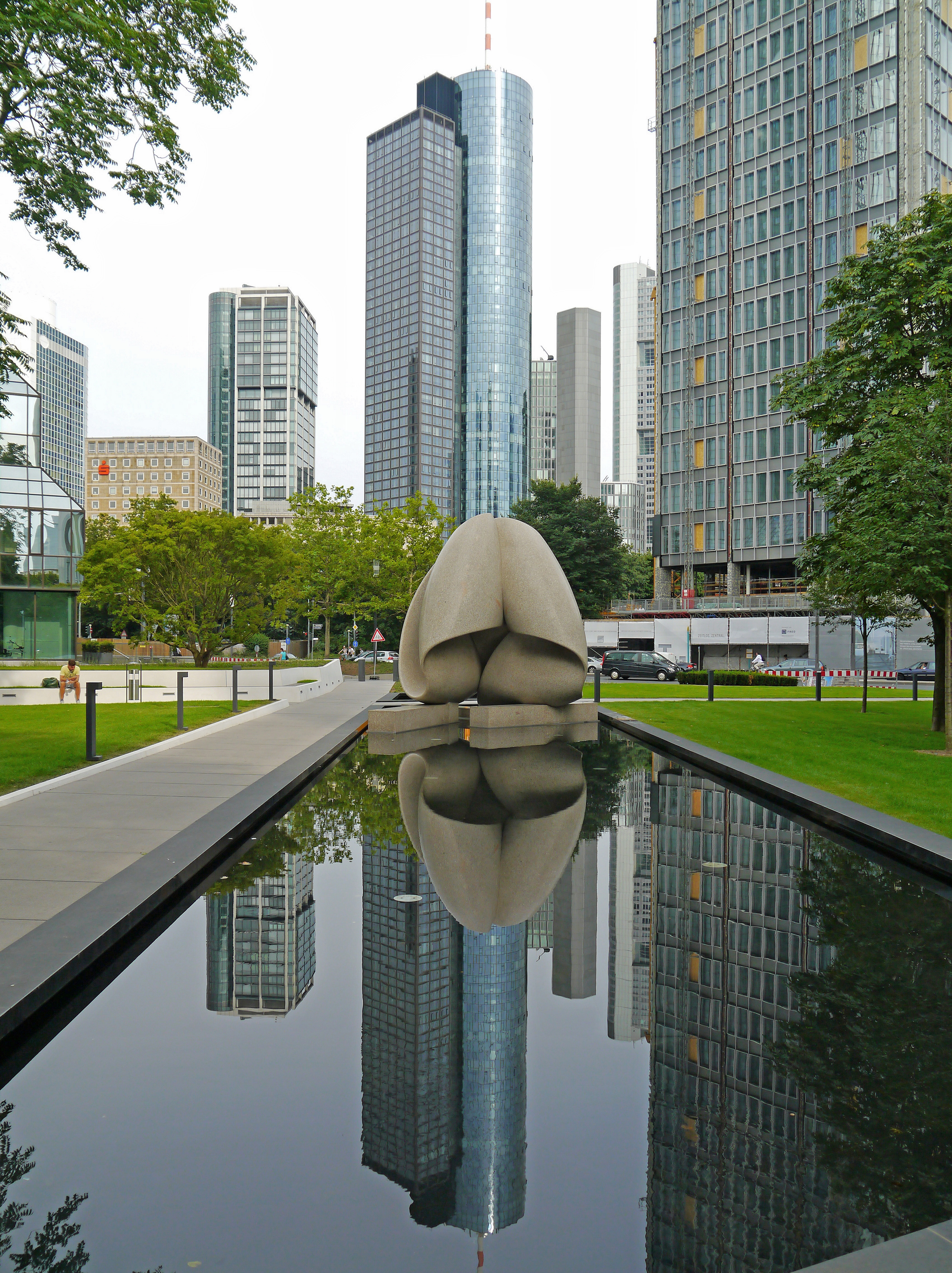 Skulptur Kontinuitaet, 1986 von Max Bill, 2012 auf dem Grundstueck der Deutschen Bank in Frankfurt am Main.